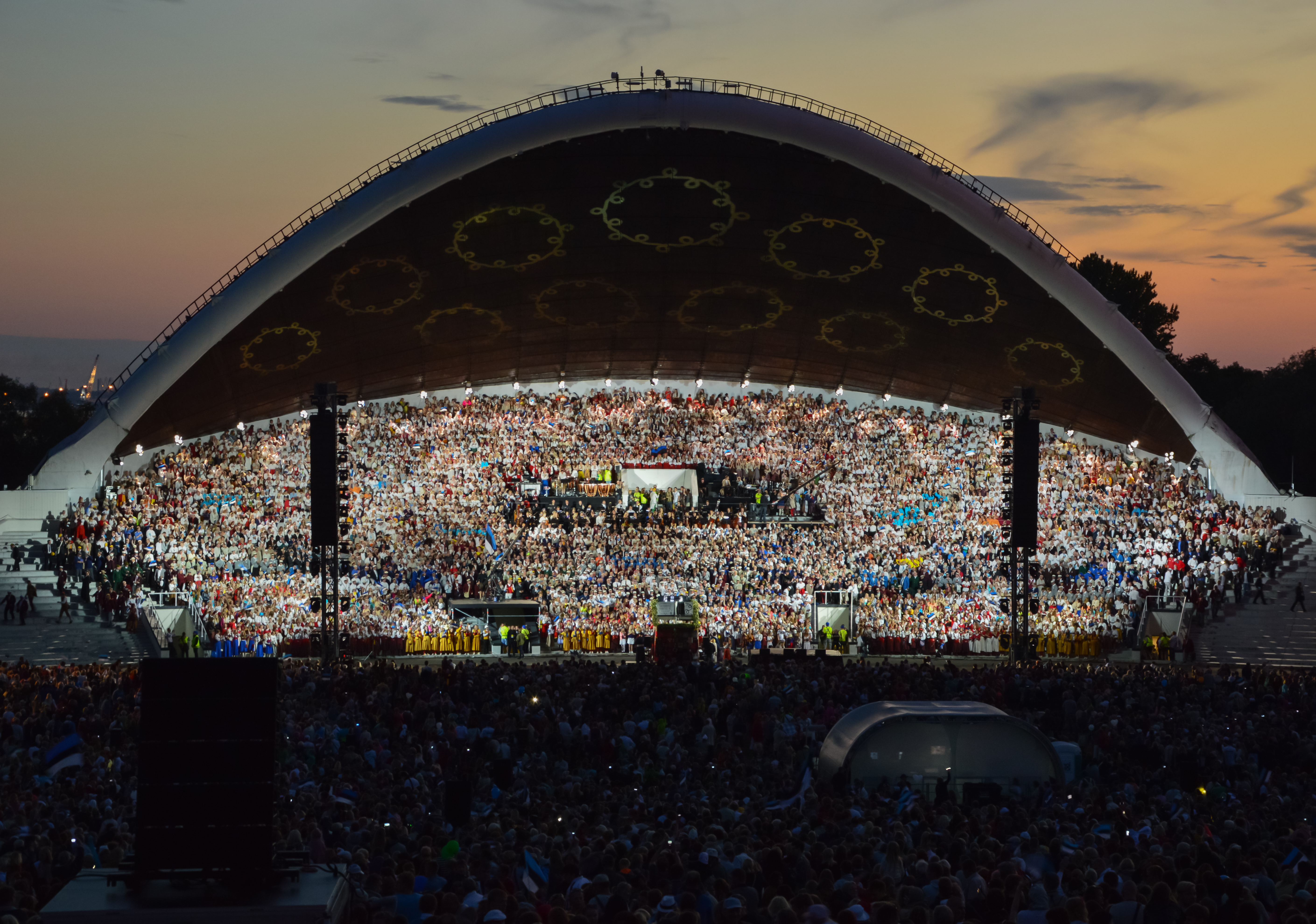 XXVI üldlaulupidu